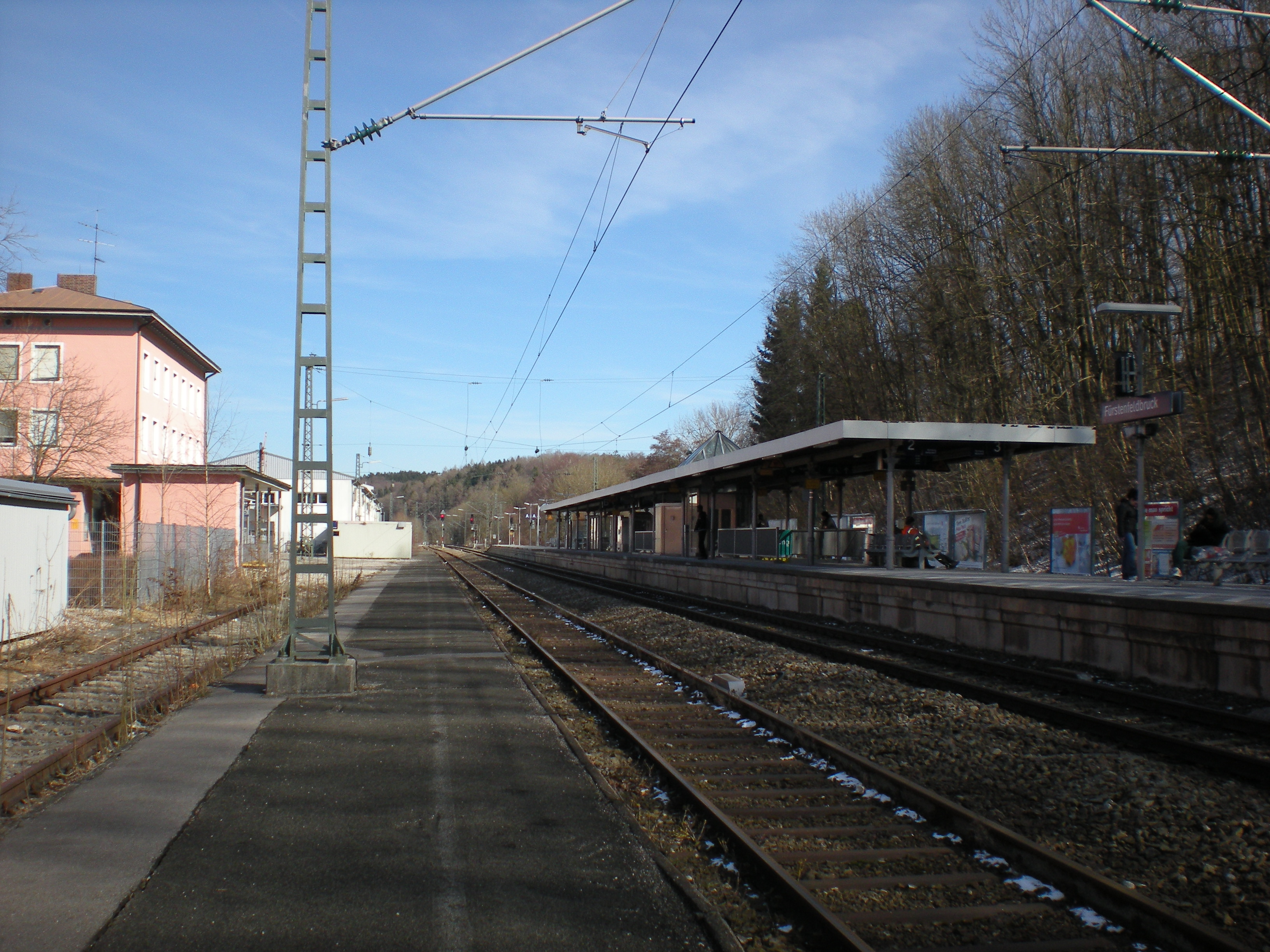 Bahnsteige des Bahnhofs Fürstenfeldbruck: links der nicht mehr genutzte Zwischenbahnsteig, rechts der Mittelbahnsteig der S-Bahn; im Hintergrund links das Empfangsgebäude